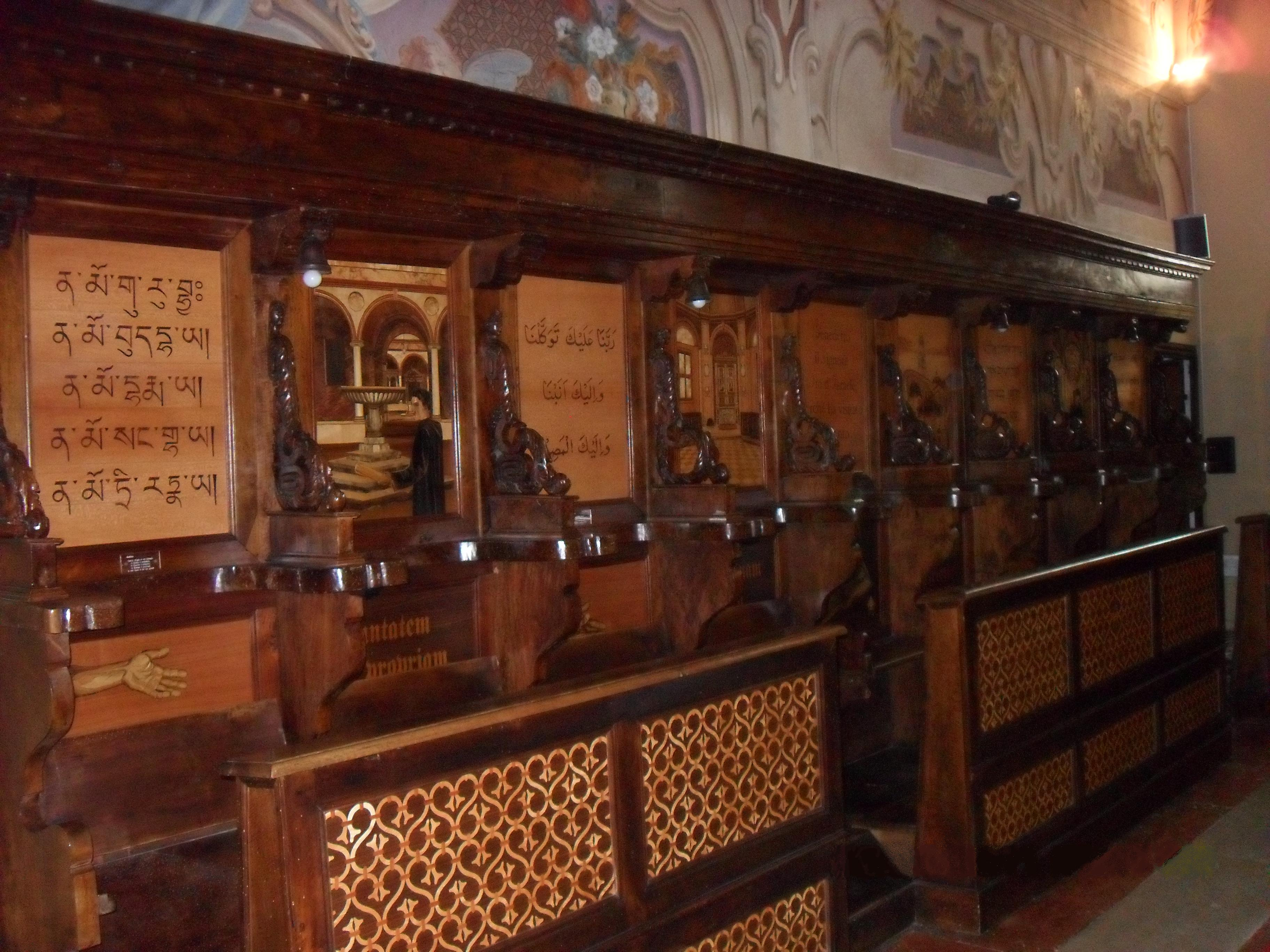 Un palco ligneo della chiesa della Badia di Torrechiara, con iscrizioni in varie lingue antiche.